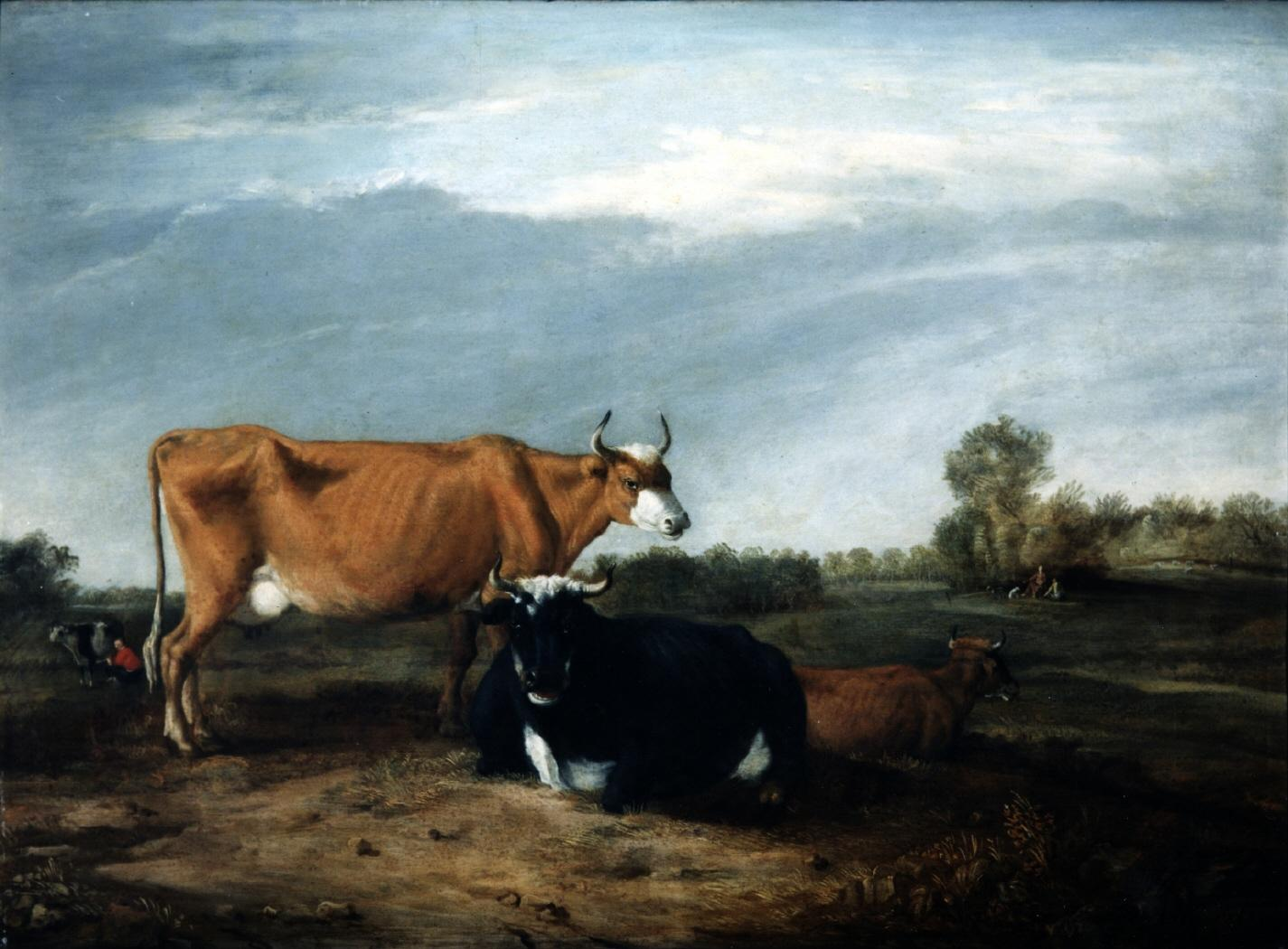 Landschaft mit Vieh (61 × 94,5 cm, Öl auf Holz)